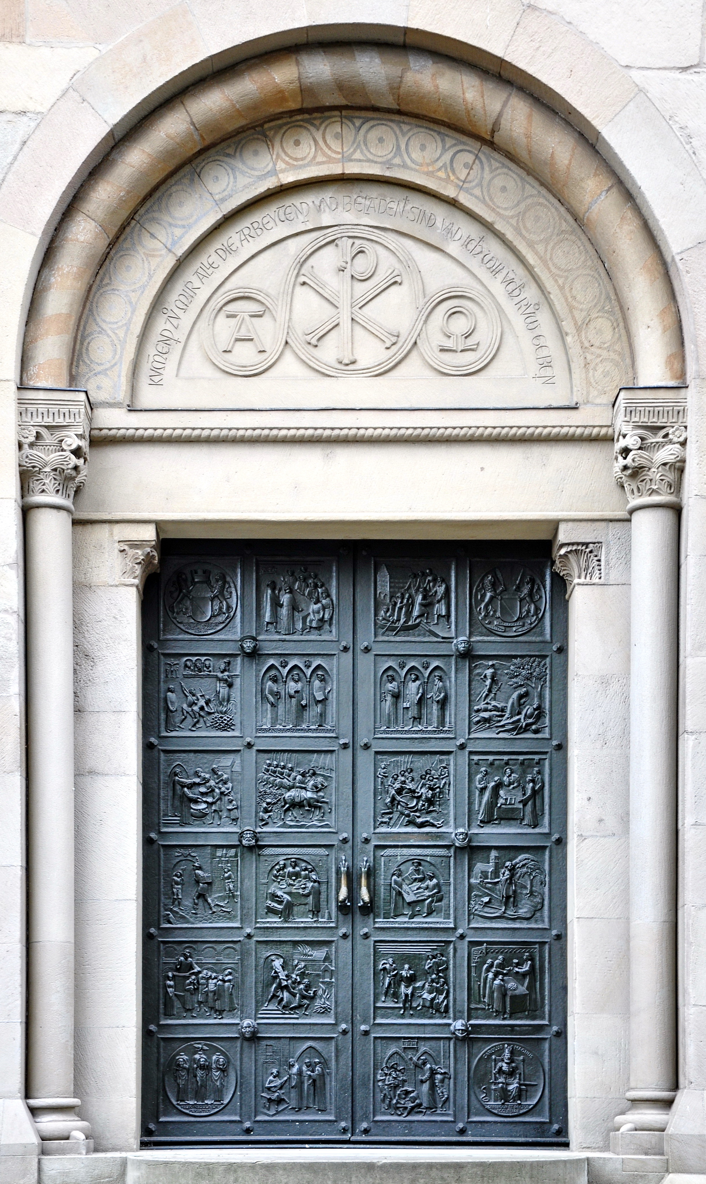 Grossmünster Zwingliportal in Zürich (Switzerland)